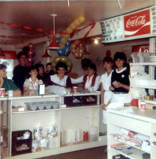 Français cadien: Voici une photo prise en 1984 au Royaume de la Patate à Plessisville, Quebec. C'est un peu difficile à voir mais le 3ième item sur le menu est "MIXTE" sans mention de Poutine